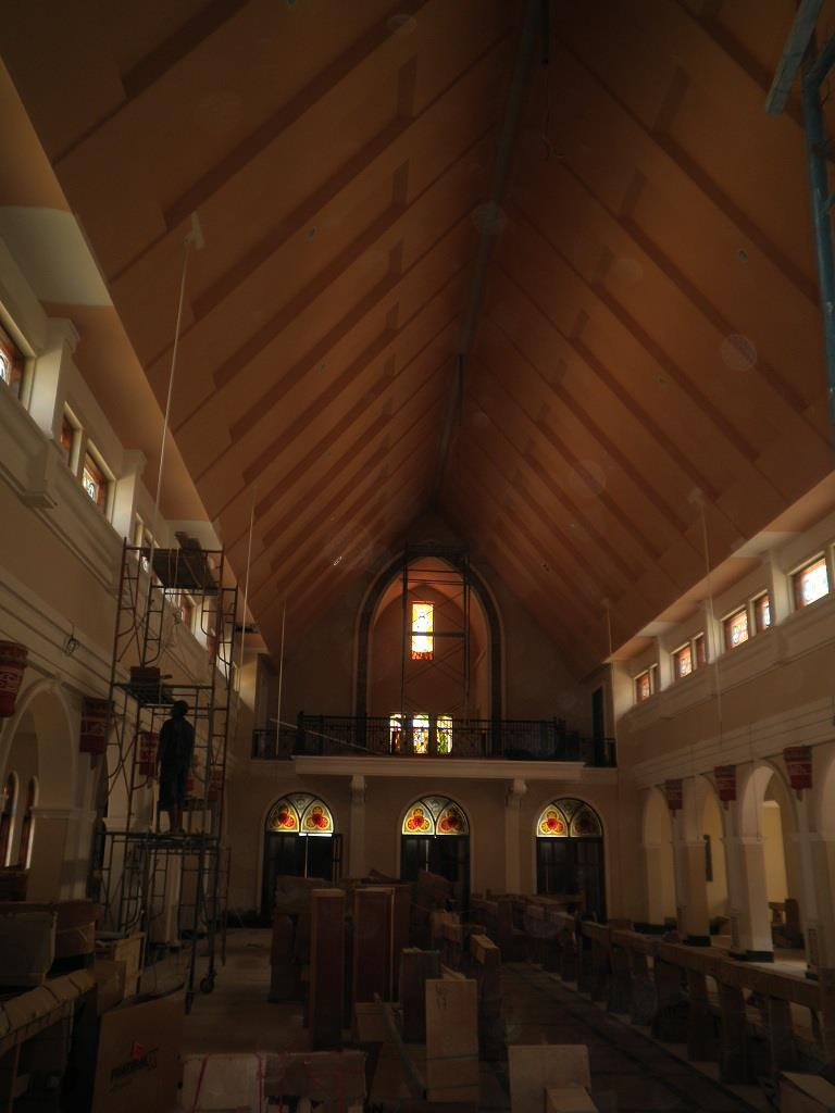 Sta. Teresinha do Menino Jesus in Ossu, Osttimor